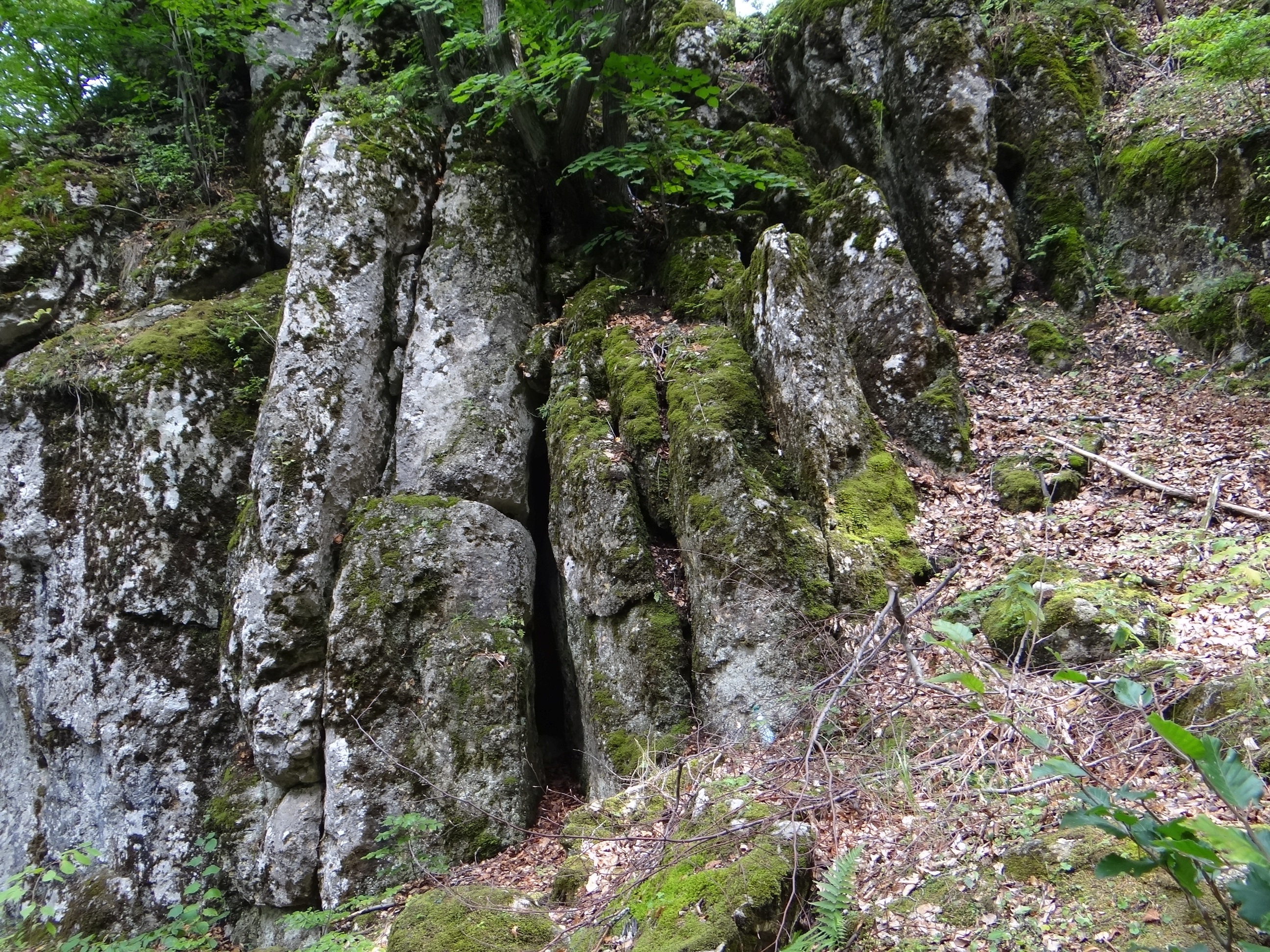 Szczelina w Popielowej Górze